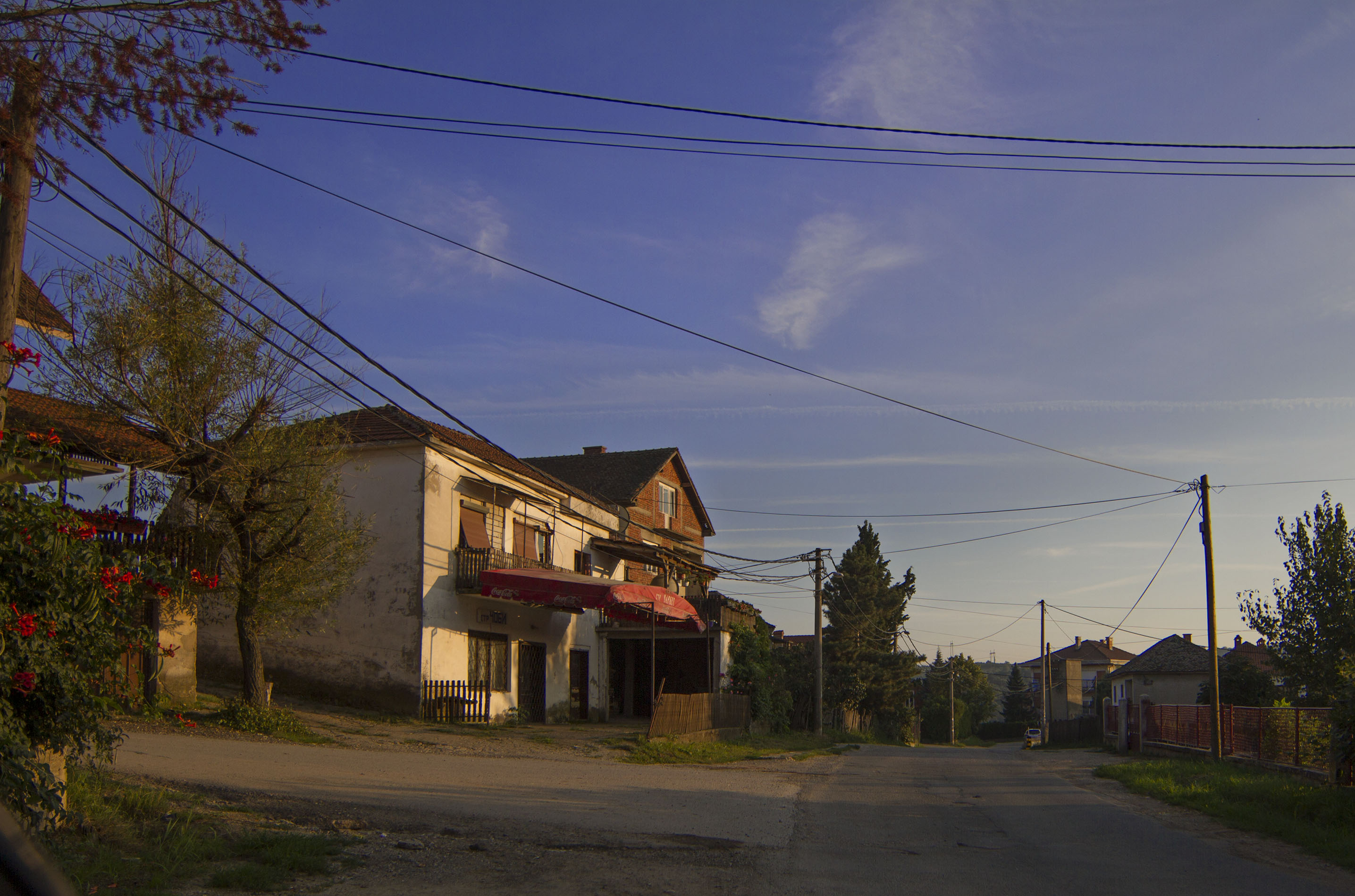 Заклопача